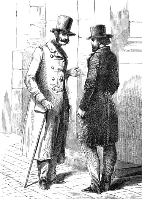 "...J'ai sollicité une rencontre avec Lagrange...". Gravure du XIXe siècle choisie par Umberto Eco pour illustrer le chapitre 14 du Cimetière de Prague.